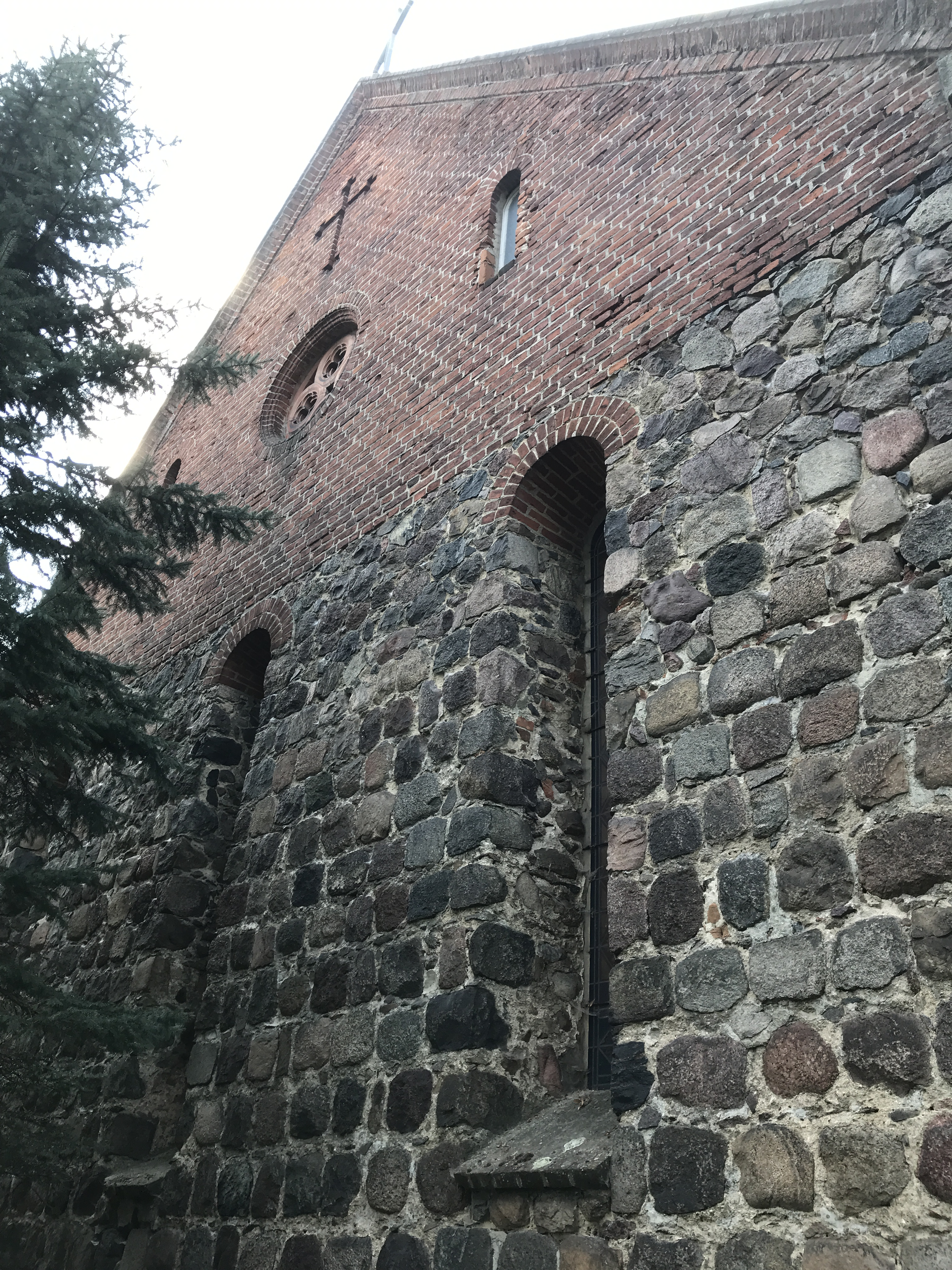 Die Dorfkirche Neuendorf im Sande der Gemeinde Steinhöfel im Landkreis Oder-Spree entstand in der zweiten Hälfte des 13. Jahrhunderts. 1938 musste der Kirchturm verkürzt werden, um die Einflugschneise für den Flugplatz Fürstenwalde zu vergrößern.